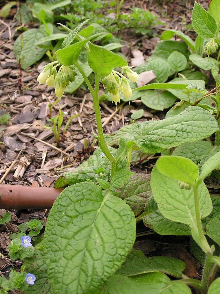 Symphytum bulbosum als Unkraut in einem Beet in Porto Venere (Italien).